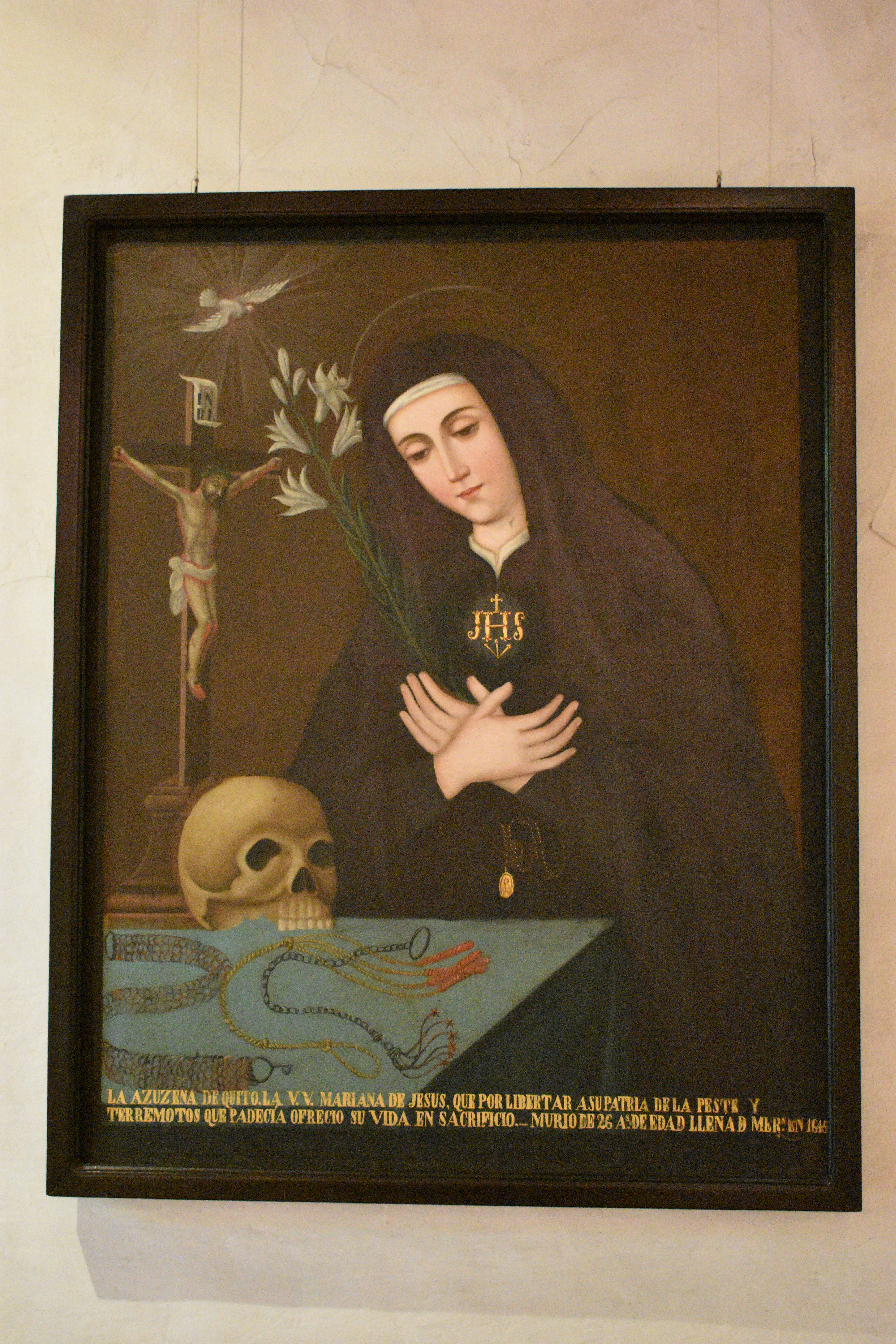 Dimensiones 102 cms x 80